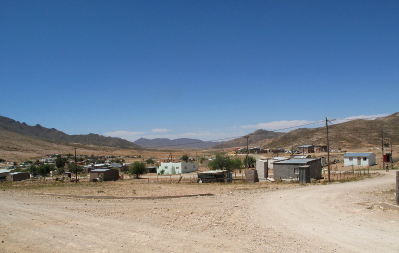 Eksteenfontein